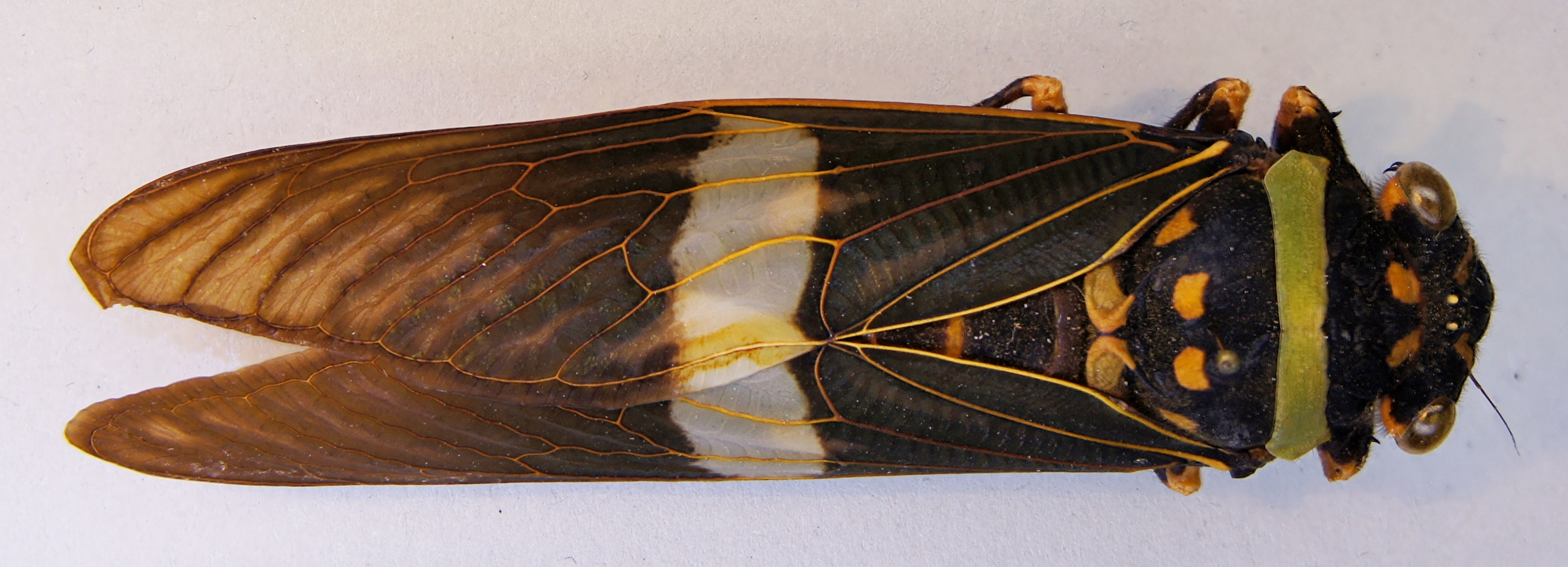 Tosena fasciata (Fabricius, 1787)